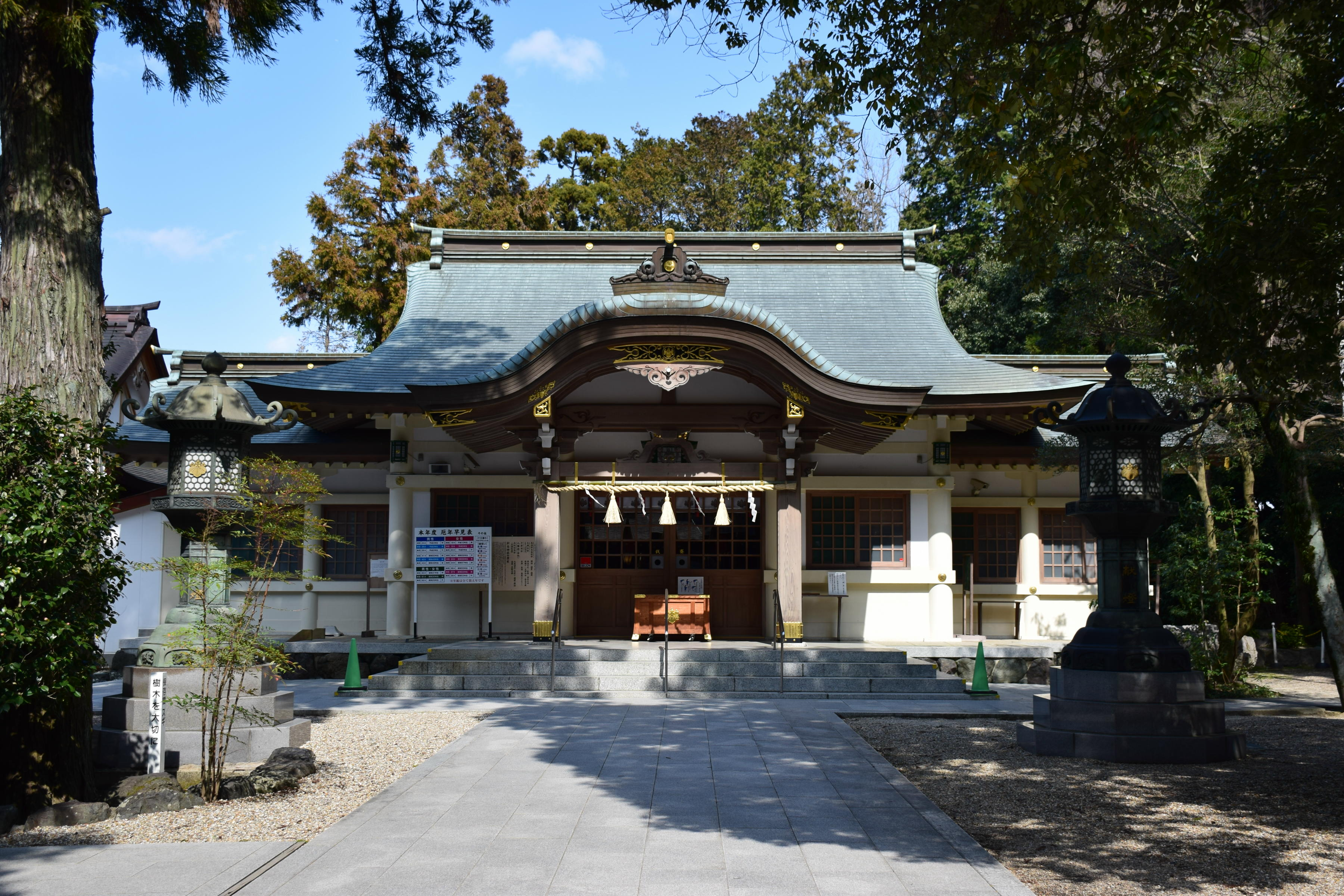 針名神社拝殿